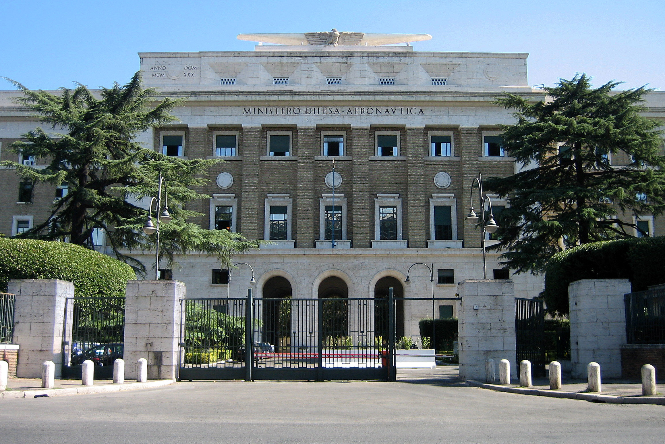 Ministero della Difesa, Palazzo Aeronautica. Già sede del ministero dell'Aeronautica, oggi dello Stato maggiore dell'Aeronautica Militare Italiana